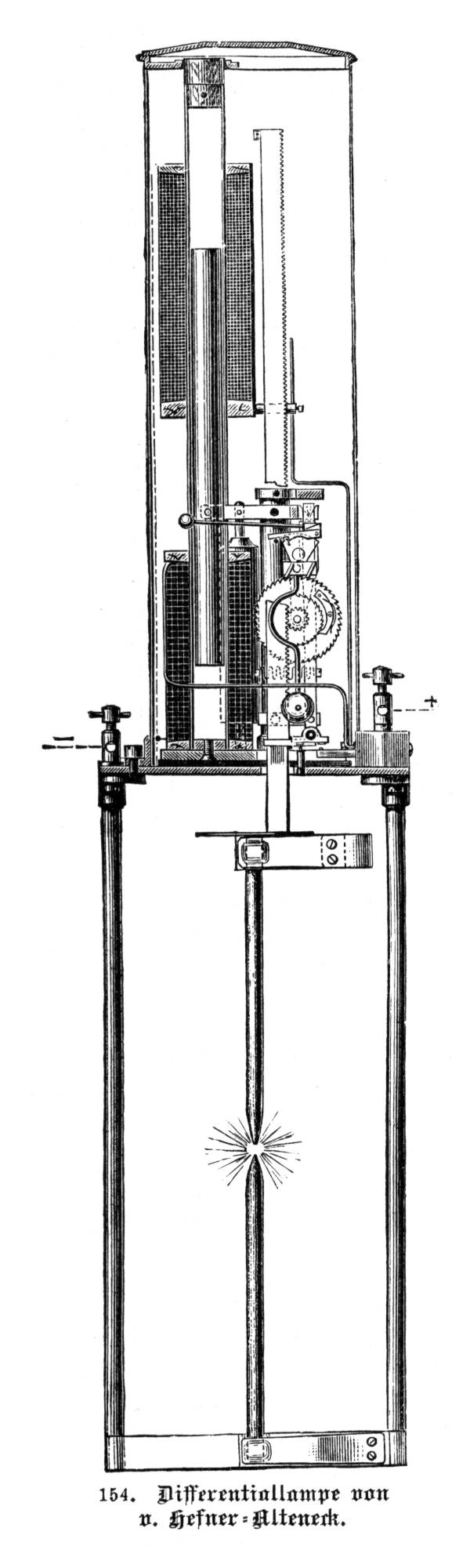 Schematische Darstellung einer Differentialbogenlampe nach Hefner-Alteneck